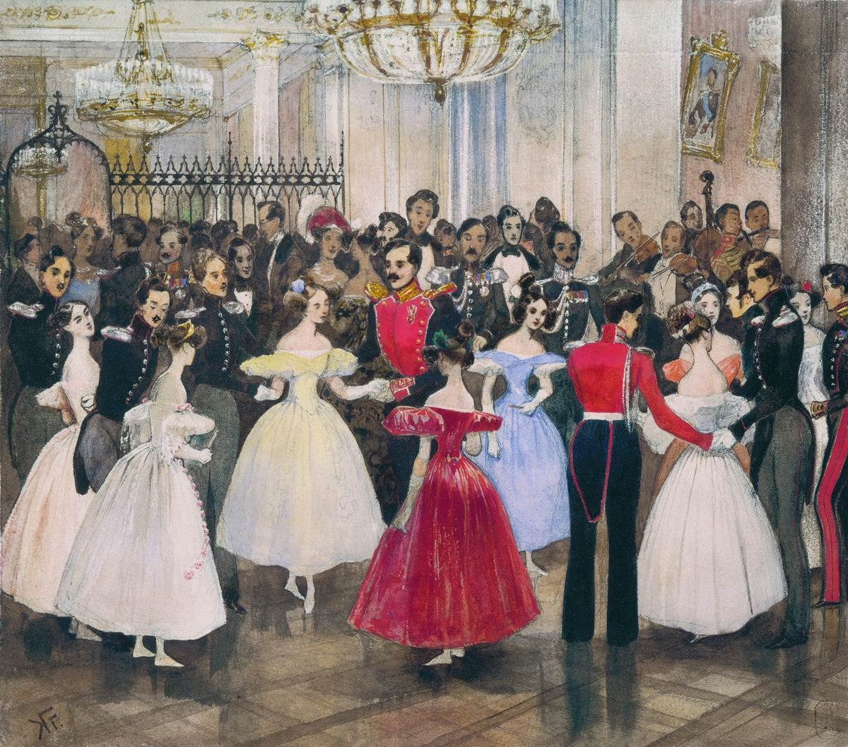 Бал у княгини М. Ф. Барятинской в 1832 году, бальная зала на Дворцовой набережной (Санкт-Петербург). Изображены: посреди зала, в красном платье, фрейлина Надежда Львовна Соллогуб, в голубом платье, фрейлина Варвара Дубенская, налево — княгиня Мария Александровна Долгорукова (ур. Апраксина). Посреди зала стоит князь А. И. Барятинский, возле него преображенец князь А. Прозоровский-Голицын; направо в лейб-казачьей форме Ф. Орлов-Денисов.